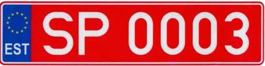 Эстонский номер для спортивных автомобилей